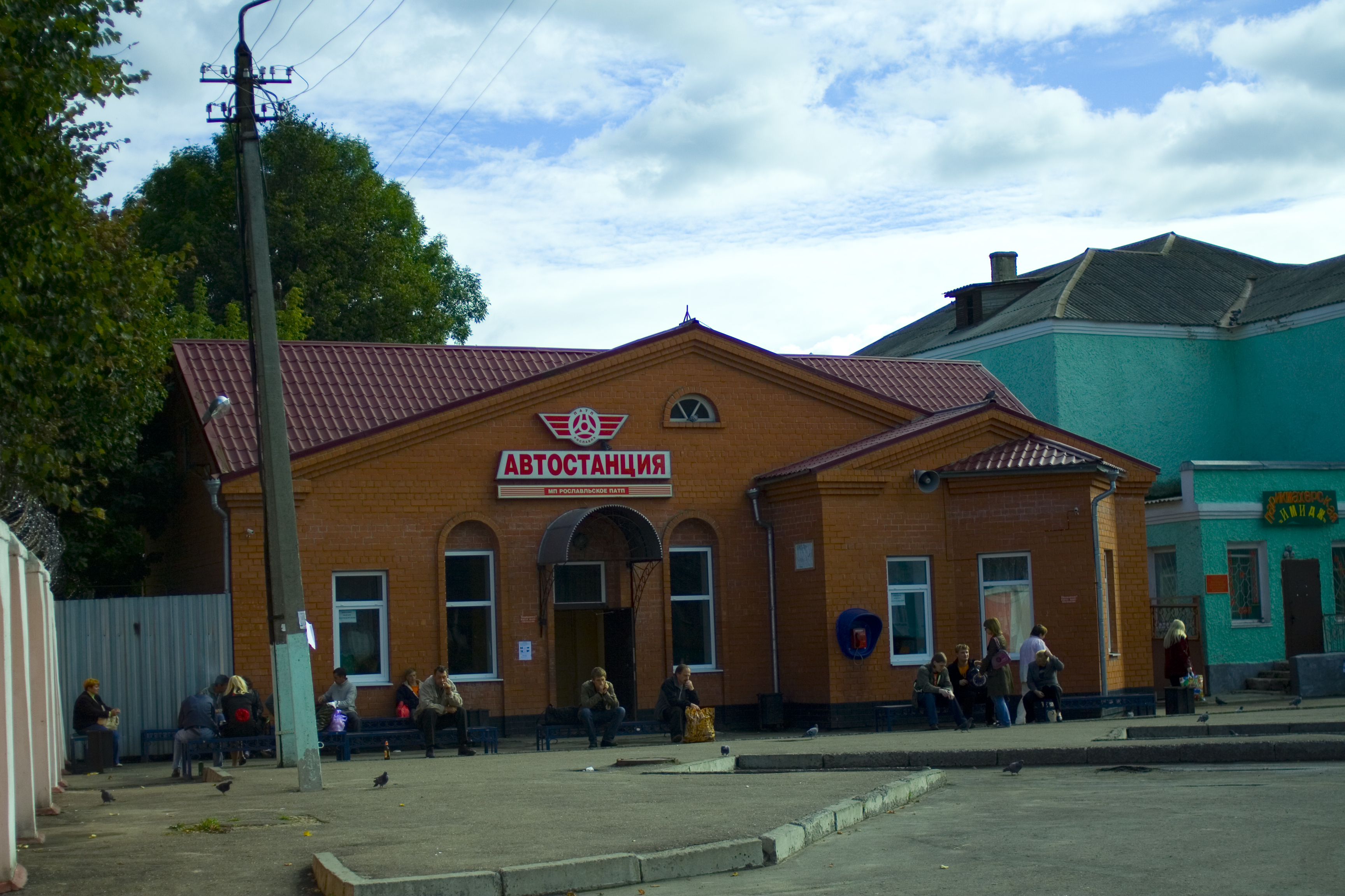 Автовокзал в Рославле